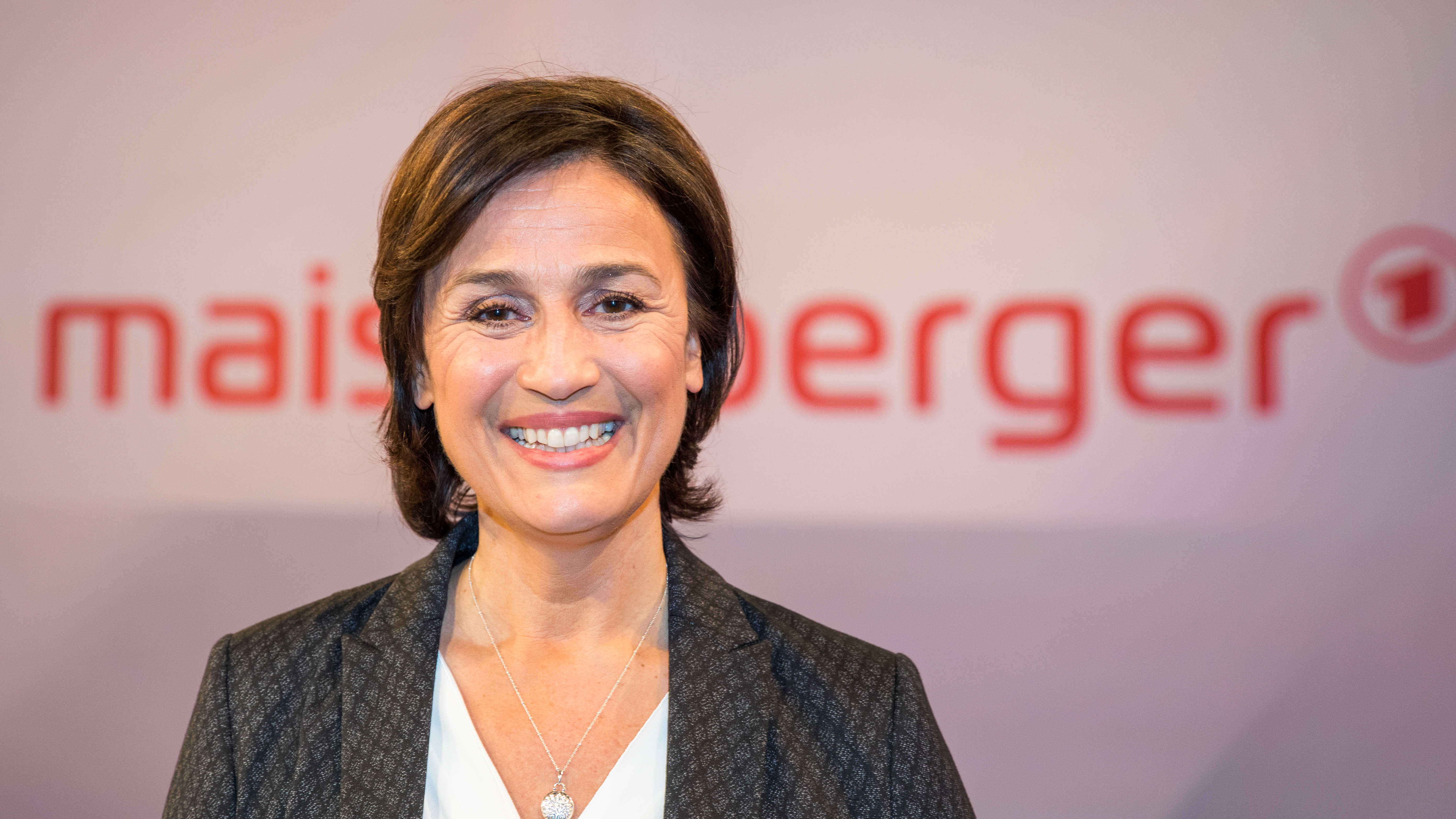 MAISCHBERGER am 6. März 2019 in Köln. Produziert vom WDR. Thema der Sendung: „Attacke auf die Reichen: Beschimpfen, besteuern, enteignen?“ Foto: Sandra Maischberger